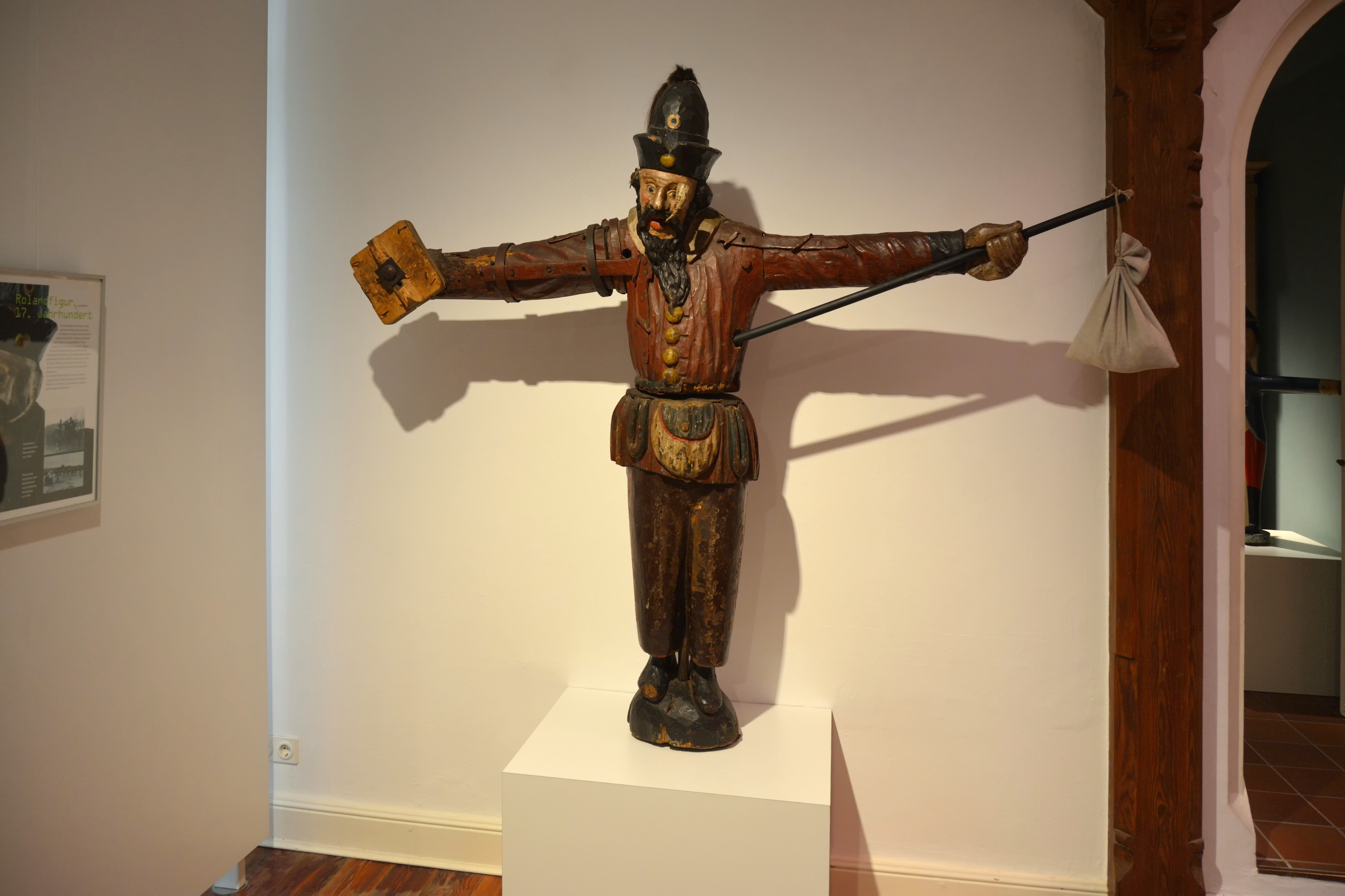 Impressionen aus dem Dithmarscher Landesmuseum Meldorfer Roland